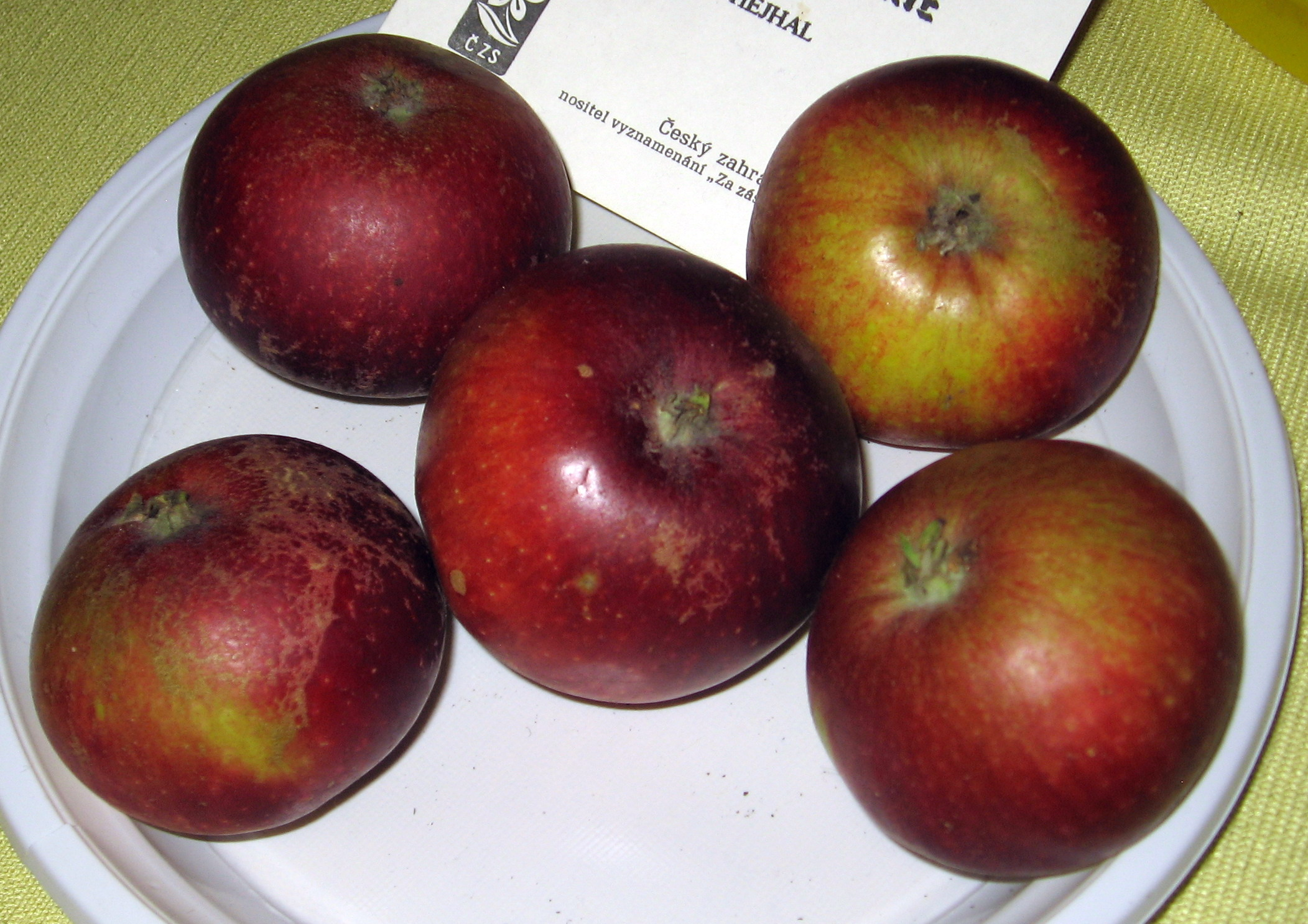 odrůda Ingrid Marie